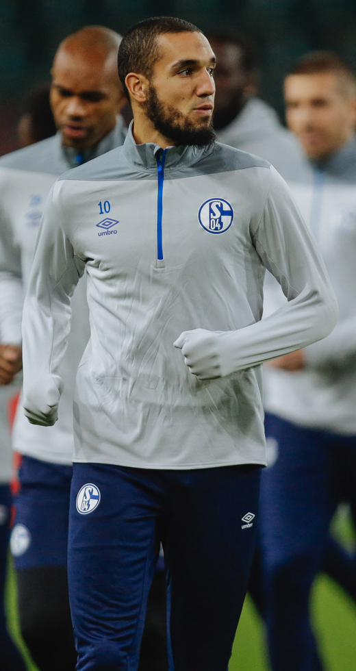 «Шальке» провел тренировку перед матчем с «Локомотивом»